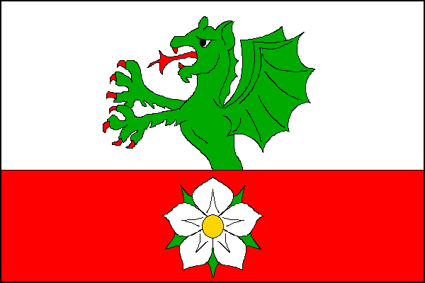 vlajka, Rouské, okres Přerov